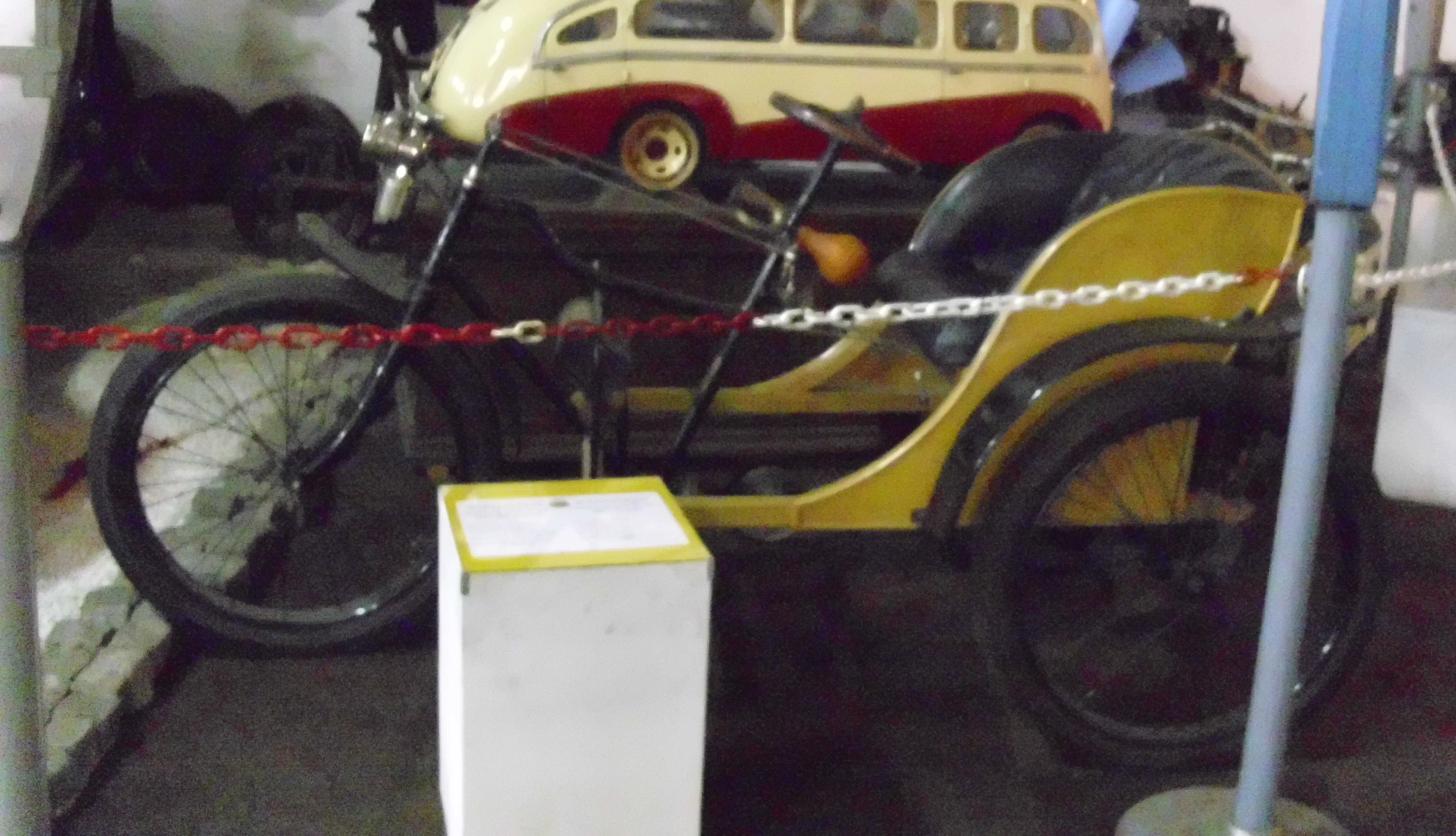 Marot-Gardon Tricycle 1898–1900 im Muzej automobila